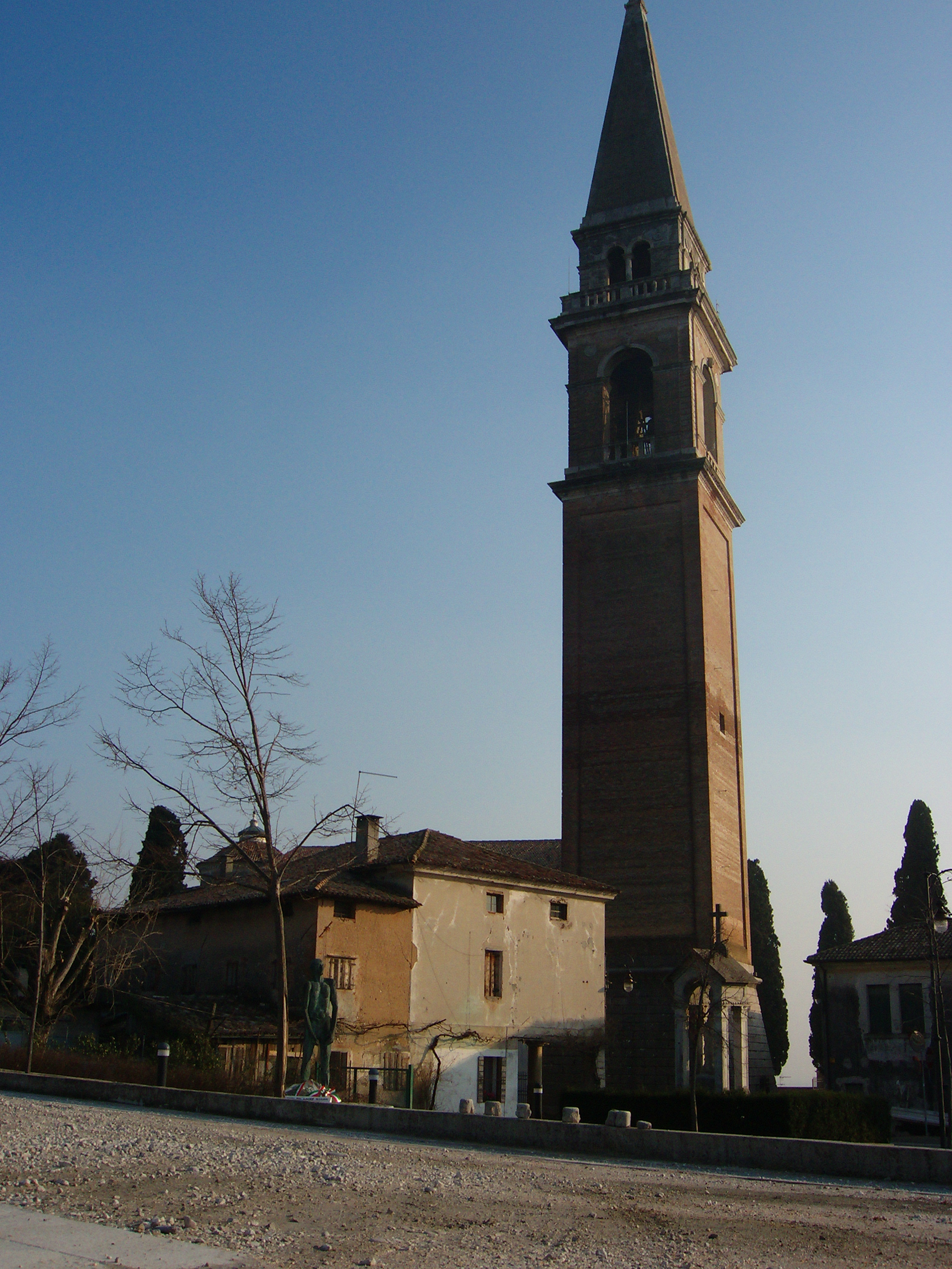 Santa Maria in Colle